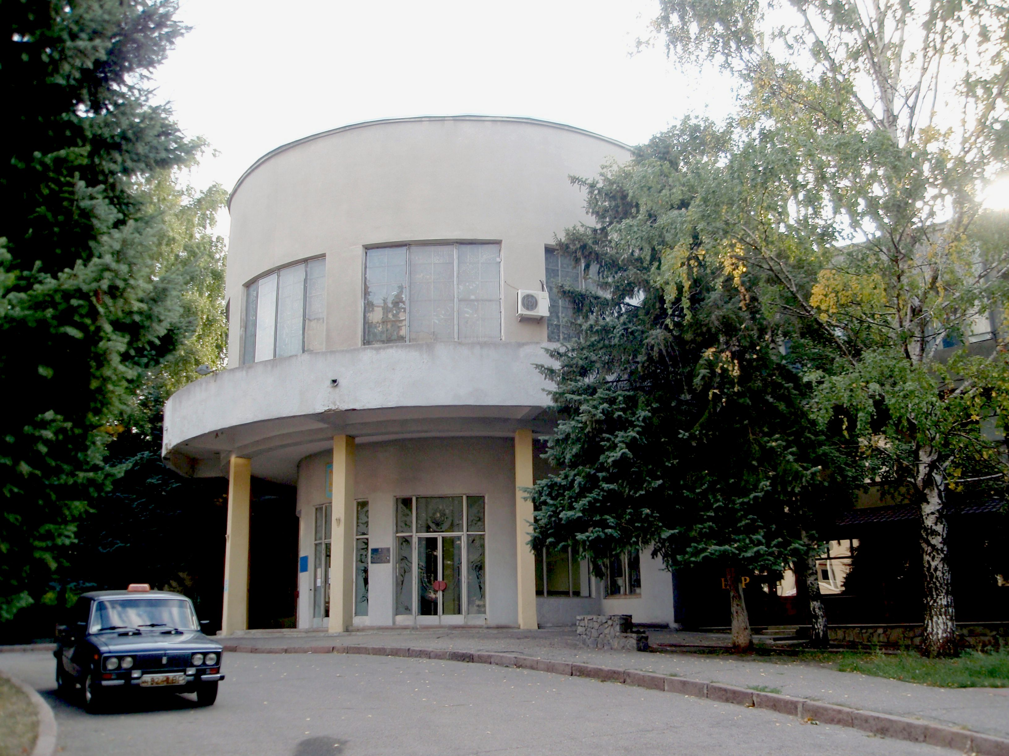 Клуб-їдальня, Харків, пров. Миру, 3